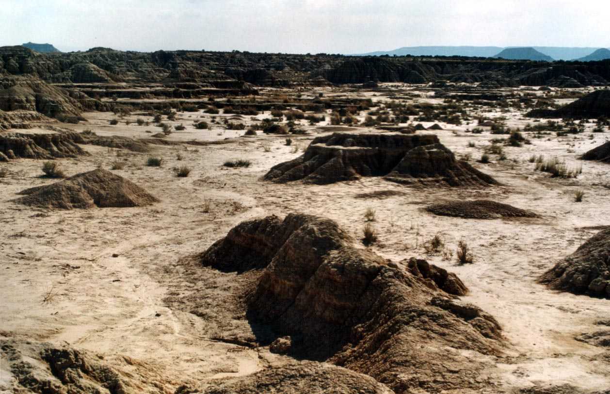 Bardenas Reales, Navarra, Spain